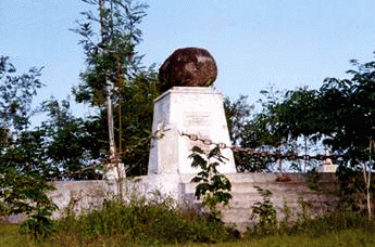 Monument en mémoire de {es}Wikipedia la Bataille de Palo Hincado, {en}Wikipedia The battle of Palo Hindo (EL SEIBO, RD)